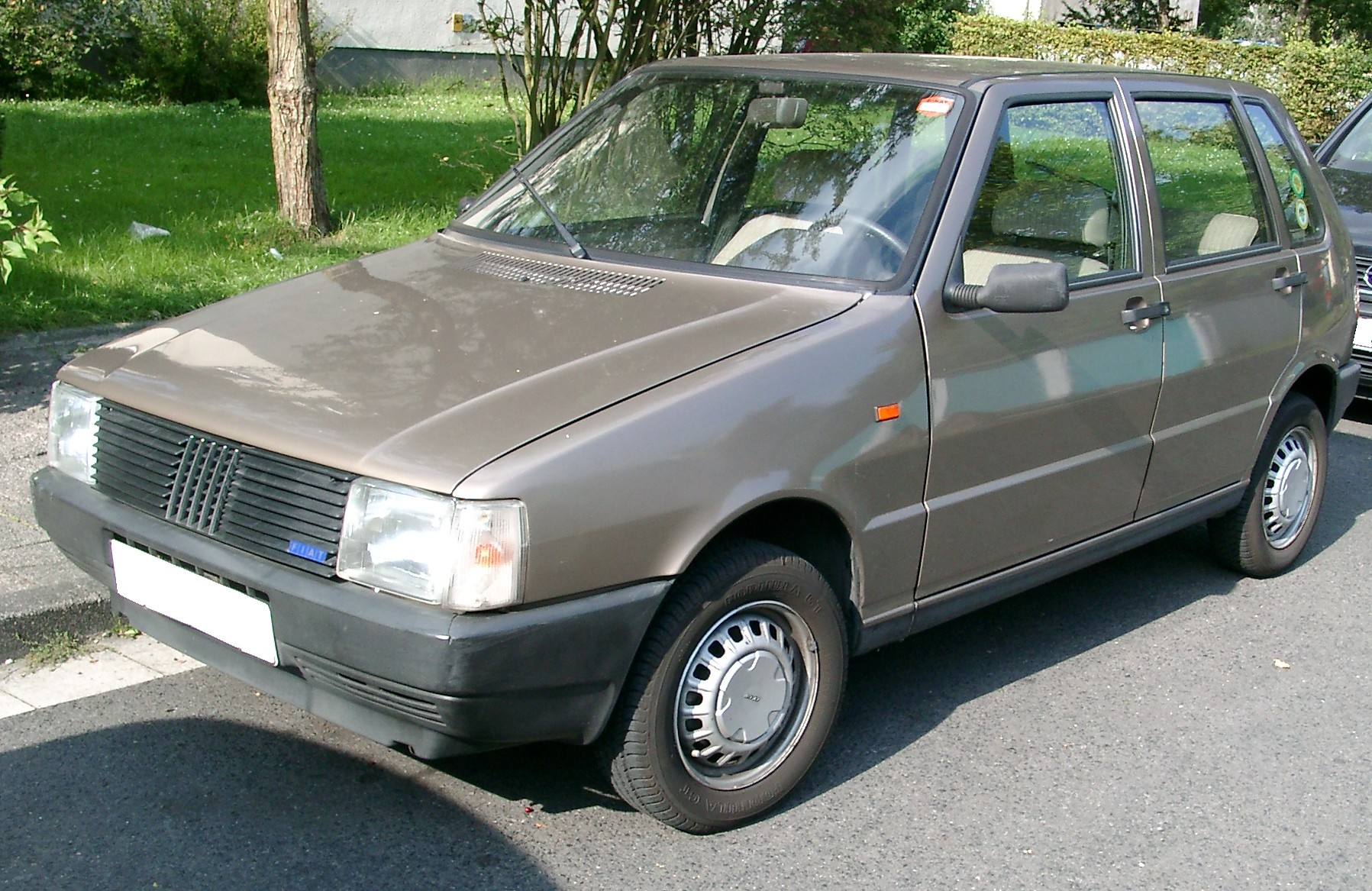 Fiat Uno Mk I